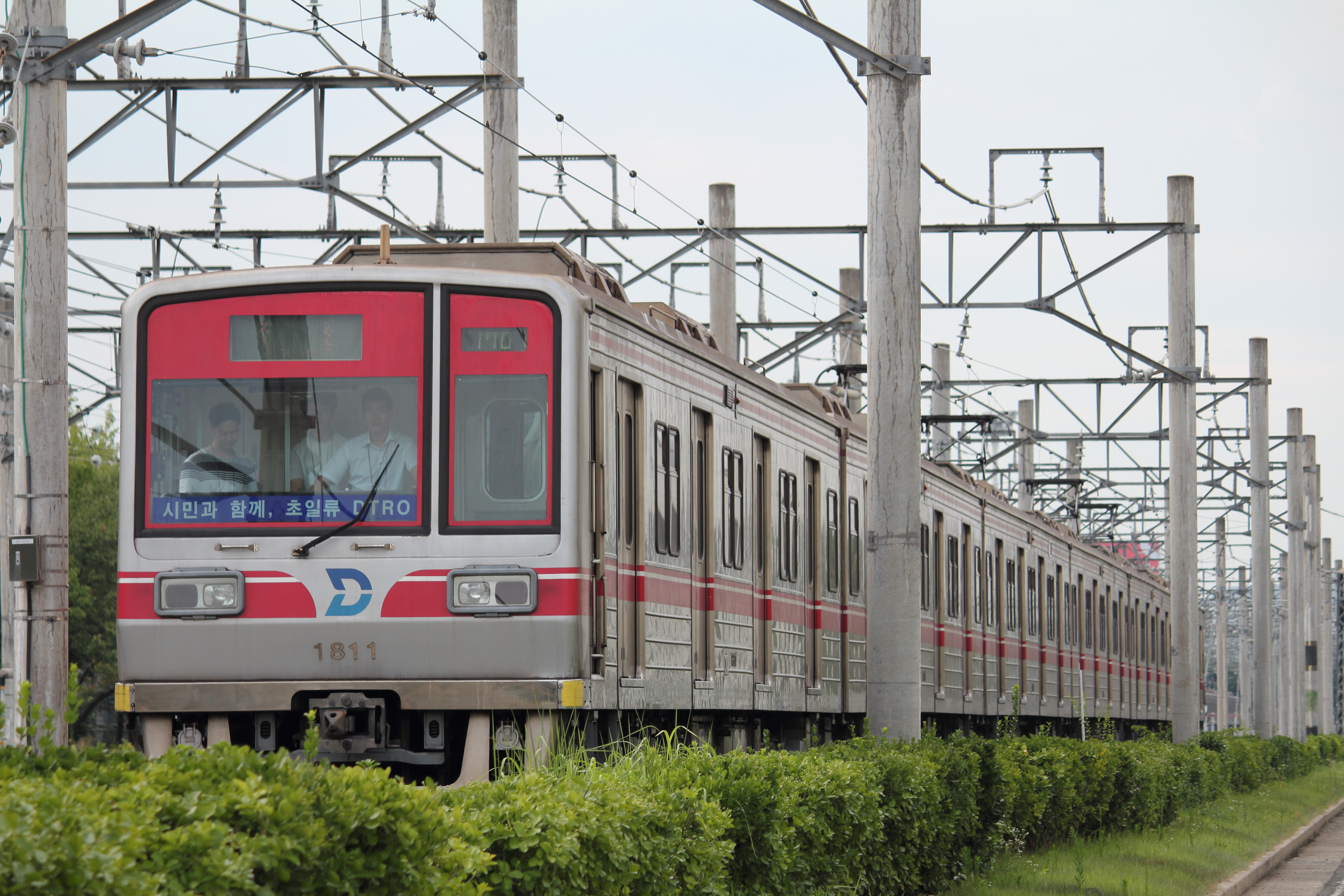 대구지하철 월배 차량기지에서 촬영